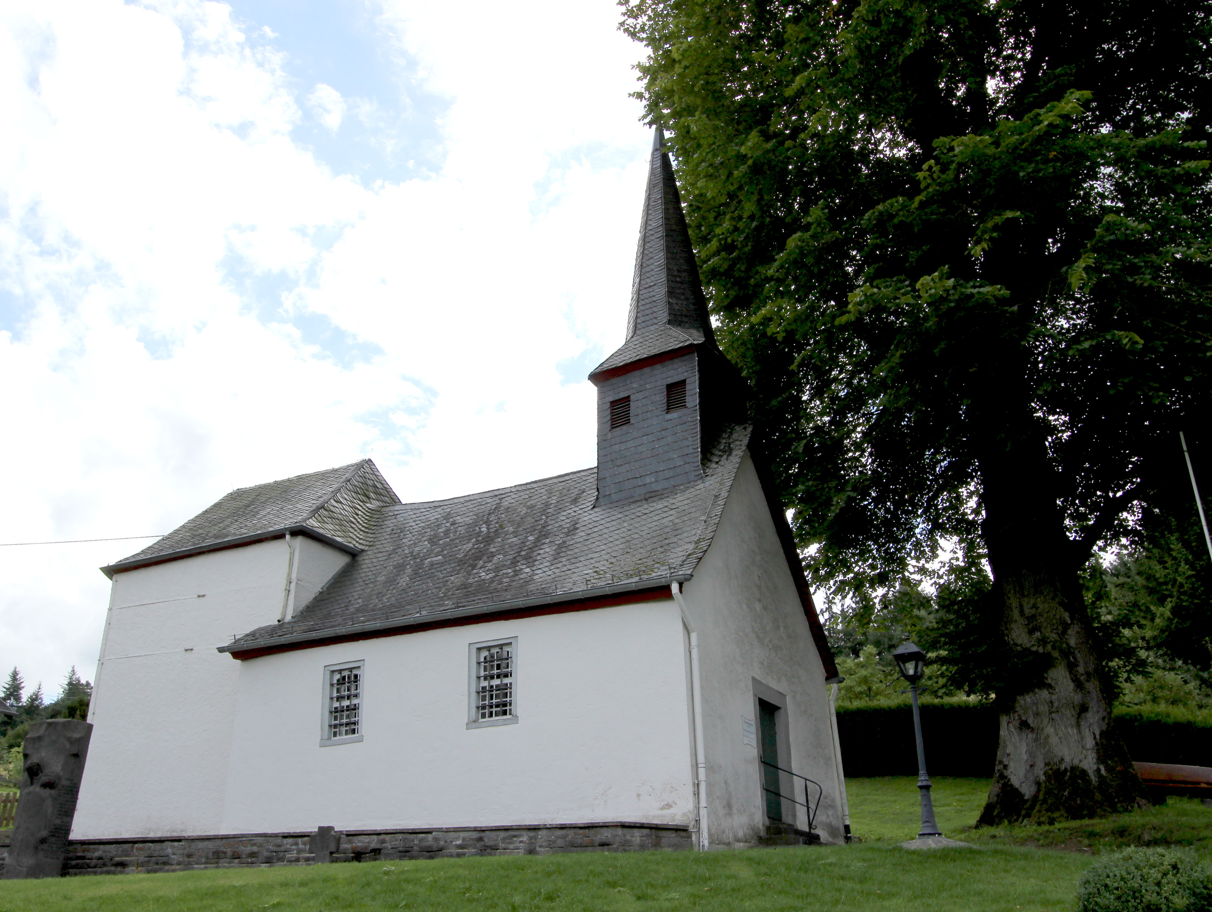 53518 Kottenborn, Kirchstraße. Katholische Filialkirche St. Antonius der Einsiedler. Chor bezeichnet 1525, Saalbau aus dem 17. Jahrhundert; Grabkreuz, bezeichnet 1673; Gesamtanlage mit umgebendem Areal. Aufnahme von 2017.